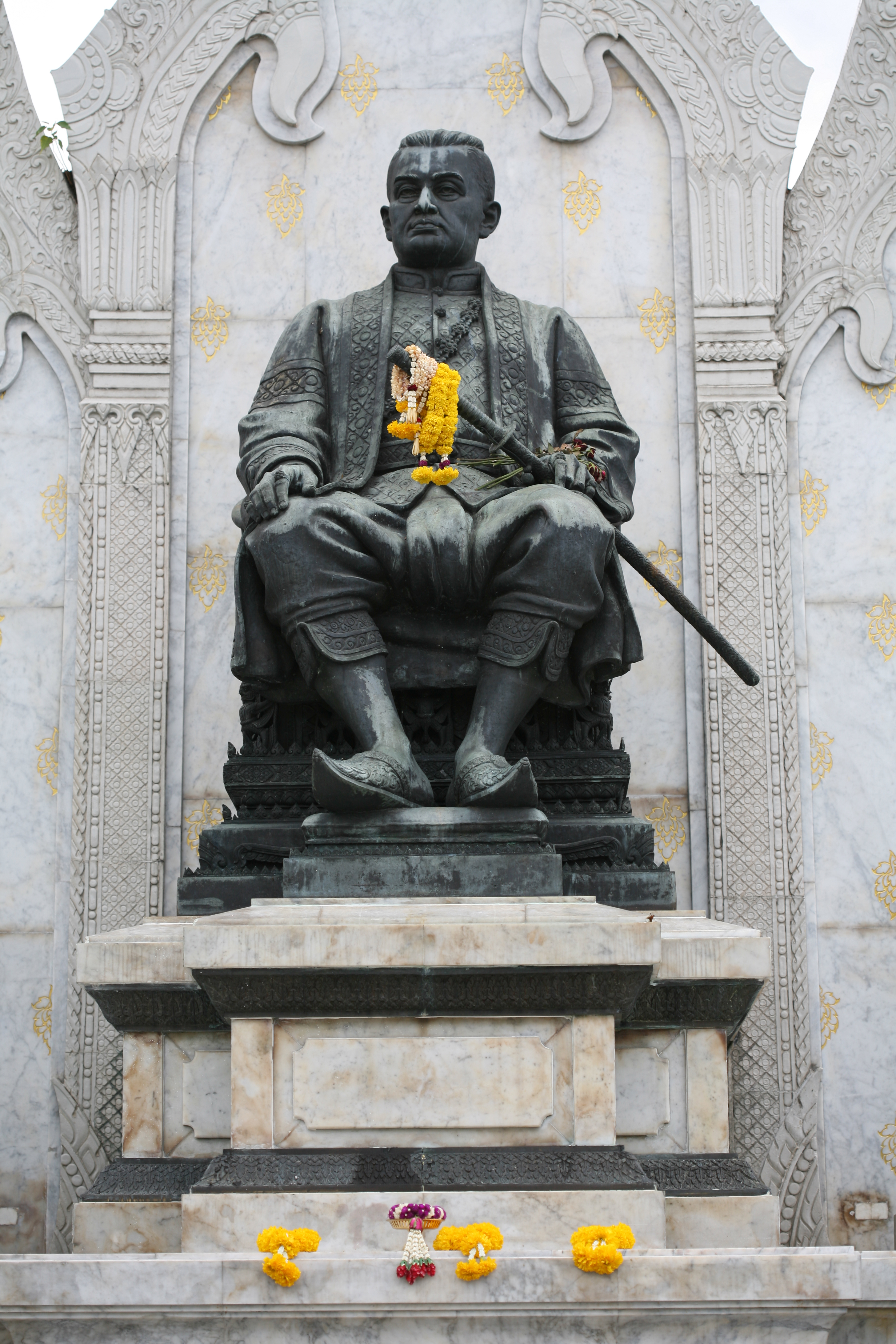 Statua del re Rama III a Thanon Ratchadamnoen Klang, Bangkok